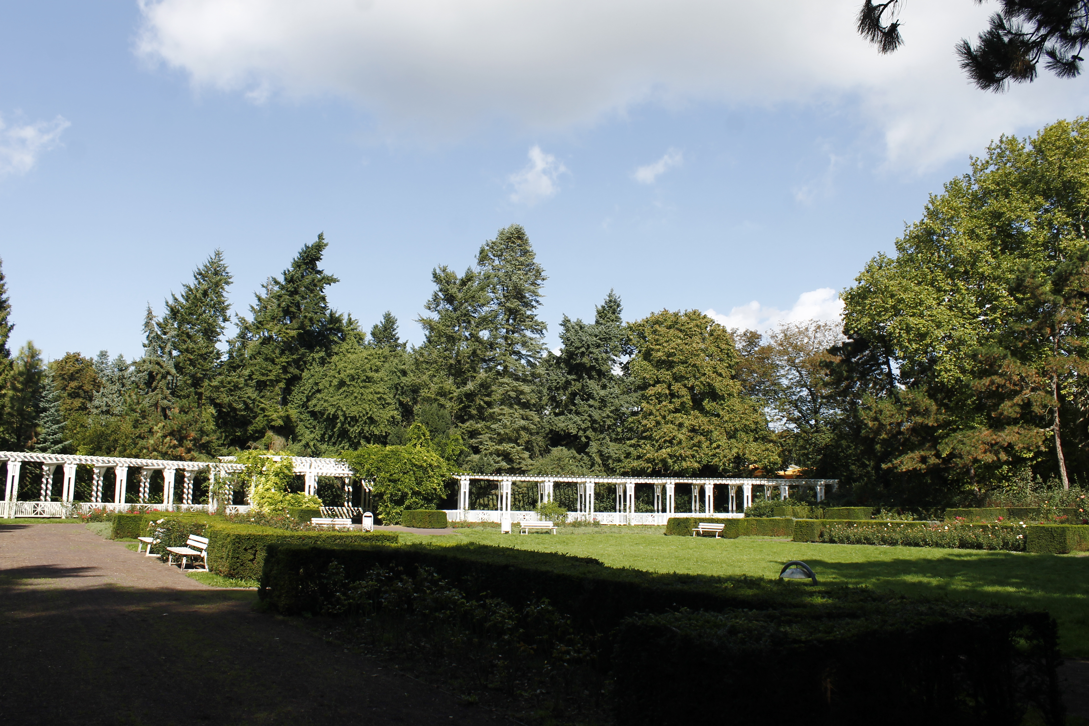 Rosengarten im Vogelsang-Park in Magdeburg-Neue Neustadt